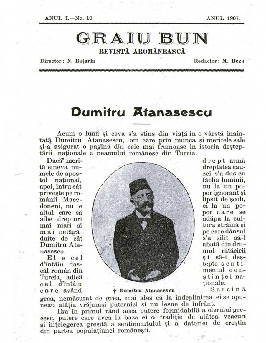 Граиу Бун, 1907, №10